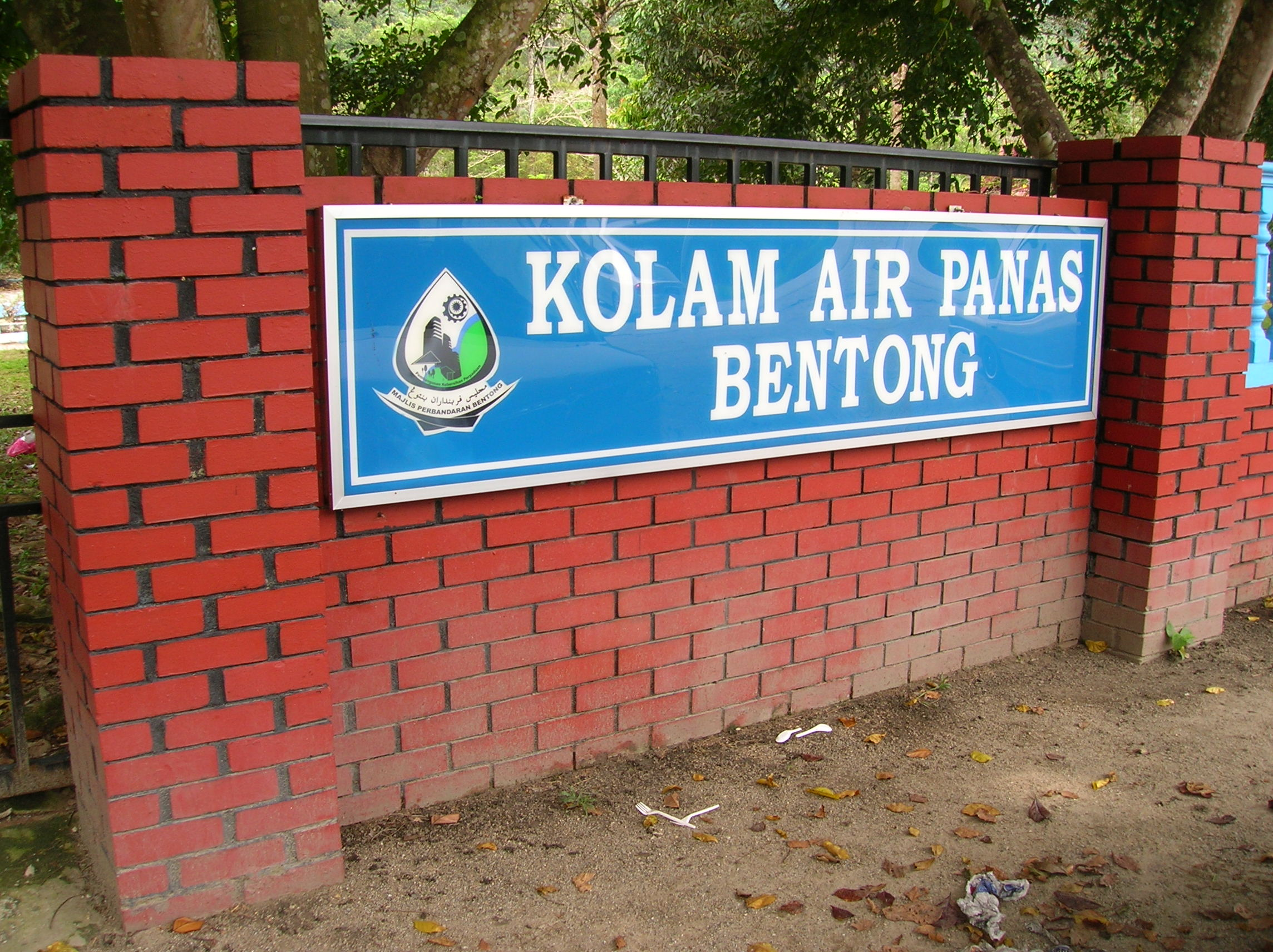 Kolam ini terletak di tepi laluan persekutuan Jalan Kuala Lumpur .